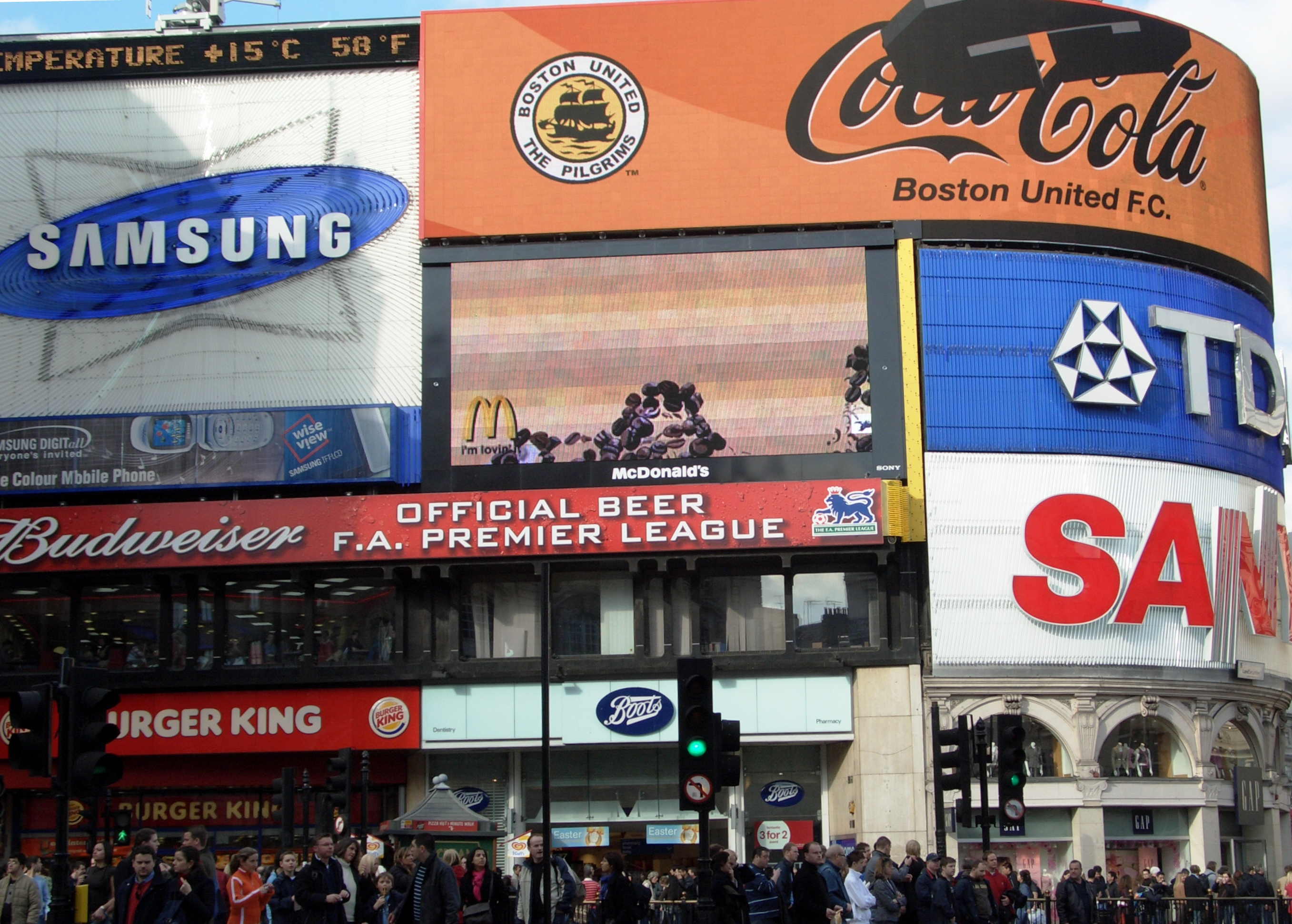 Londres - Piccadilly Circus de dia